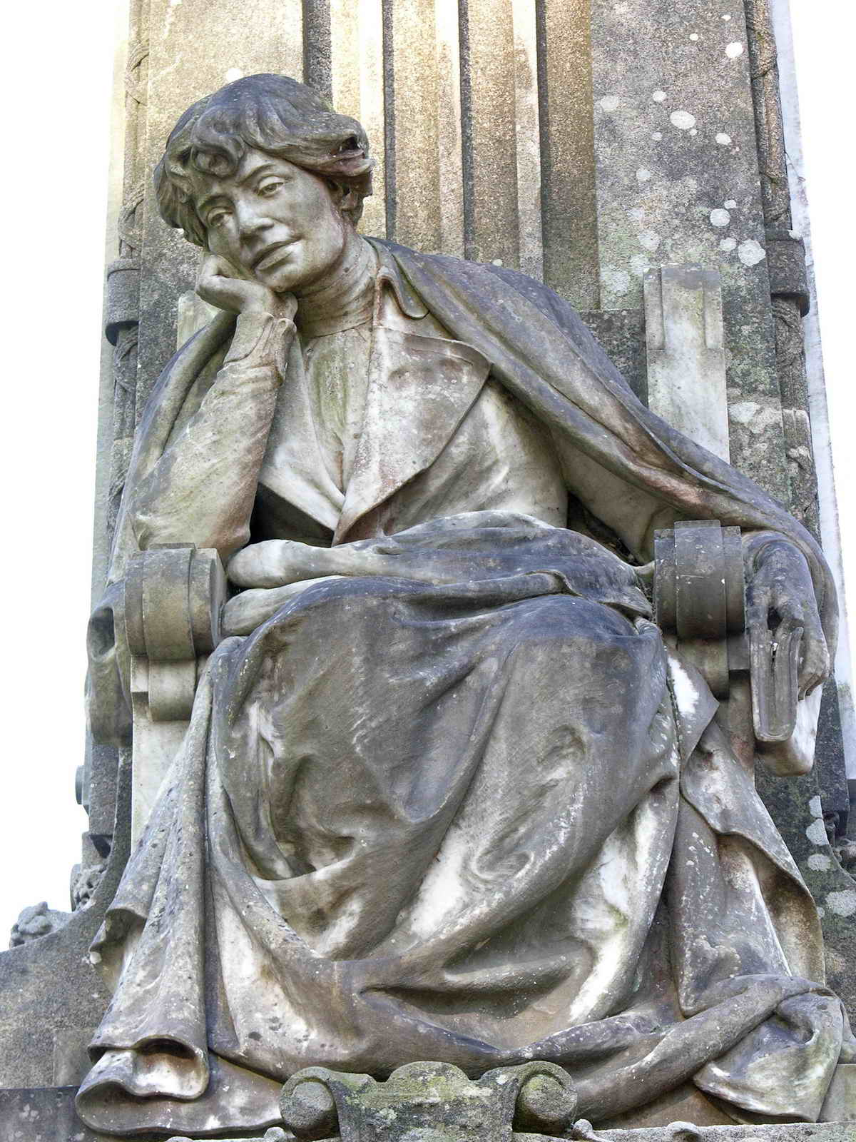 Santiago de Compostela. Rosalía de Castro. Estatua de Francisco Crivillés (1917) na Alameda (parque)